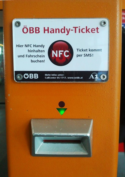 Fahrscheinentwerter der Österreichischen Bundesbahnen